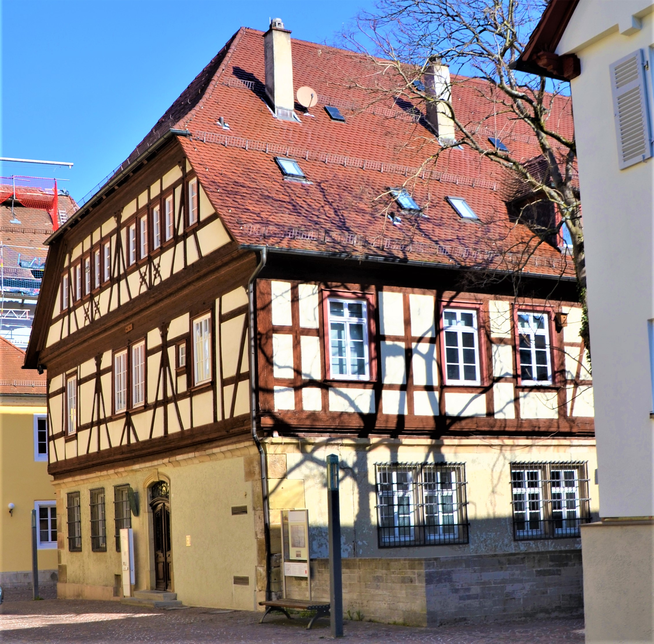 Stadtarchiv Scwhäbisch Gmünd von Südwesten